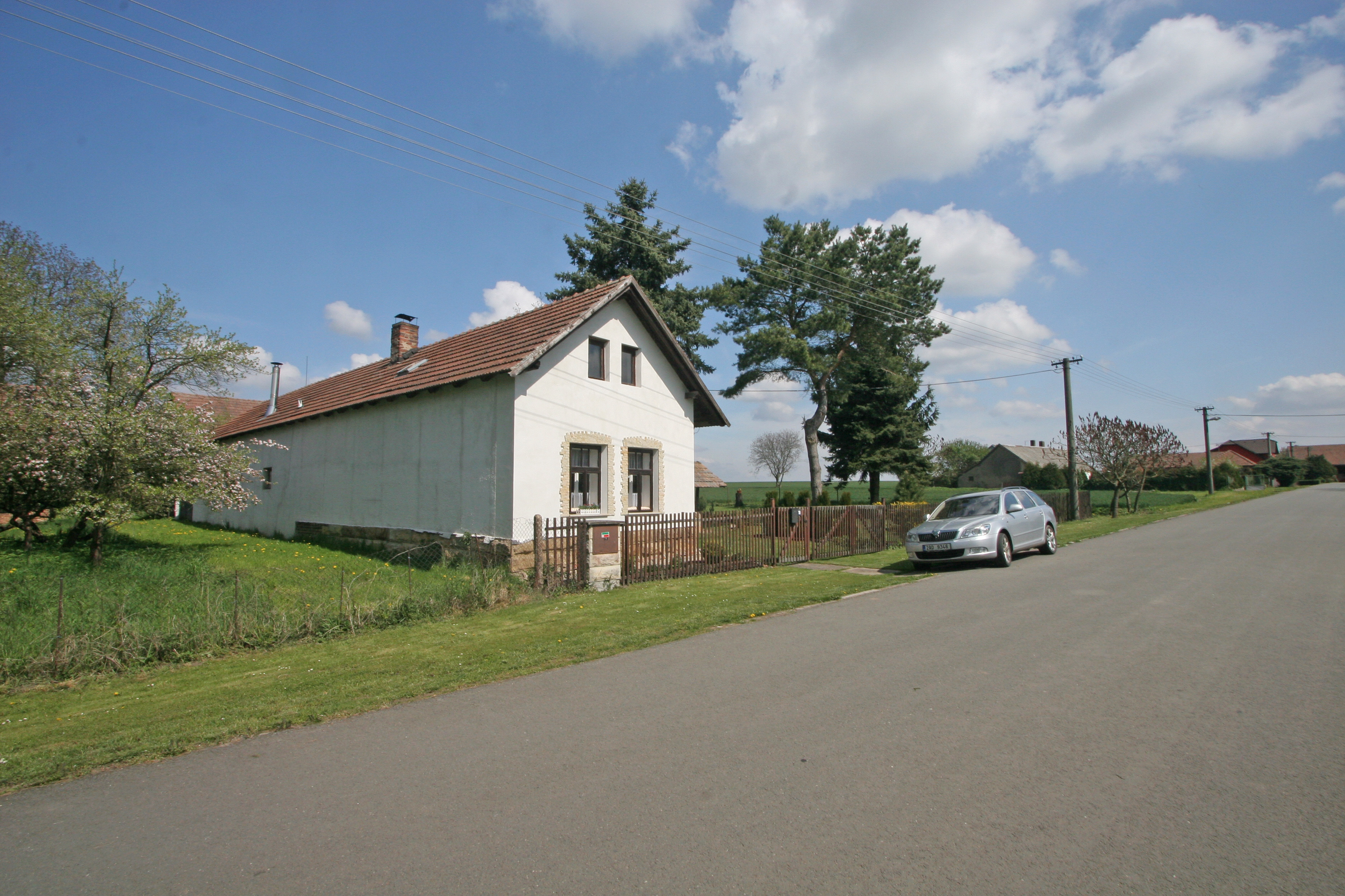 Kozojídky čp. 18